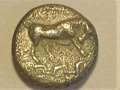 Hemiobol aus Magnesia ad Maeandrum, Stier nach rechts über Mäanderband